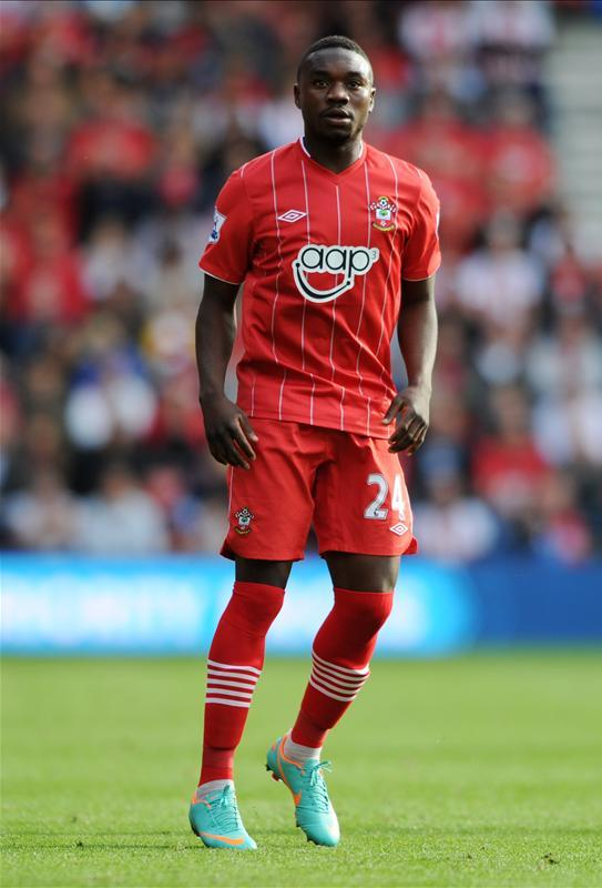 Emmanuel Mayuka avec Southampton en 2013